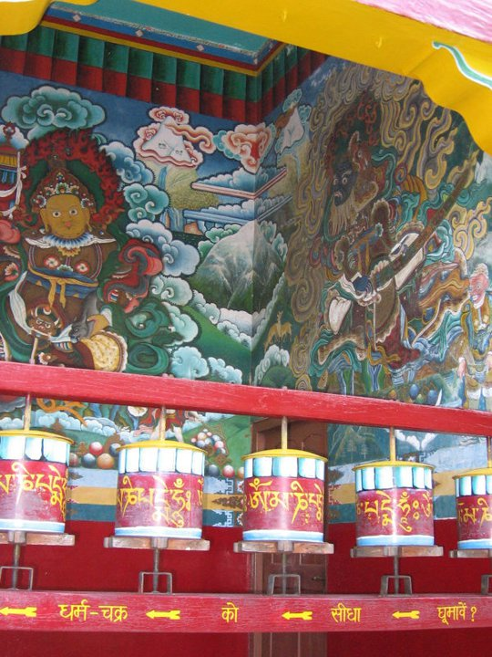 Modlitebné mlynčeky u vchodu do tibetského budhistického chrámu v indickom mestečku Sárnáth. Autorom fotagrafie je Milan Fujda.